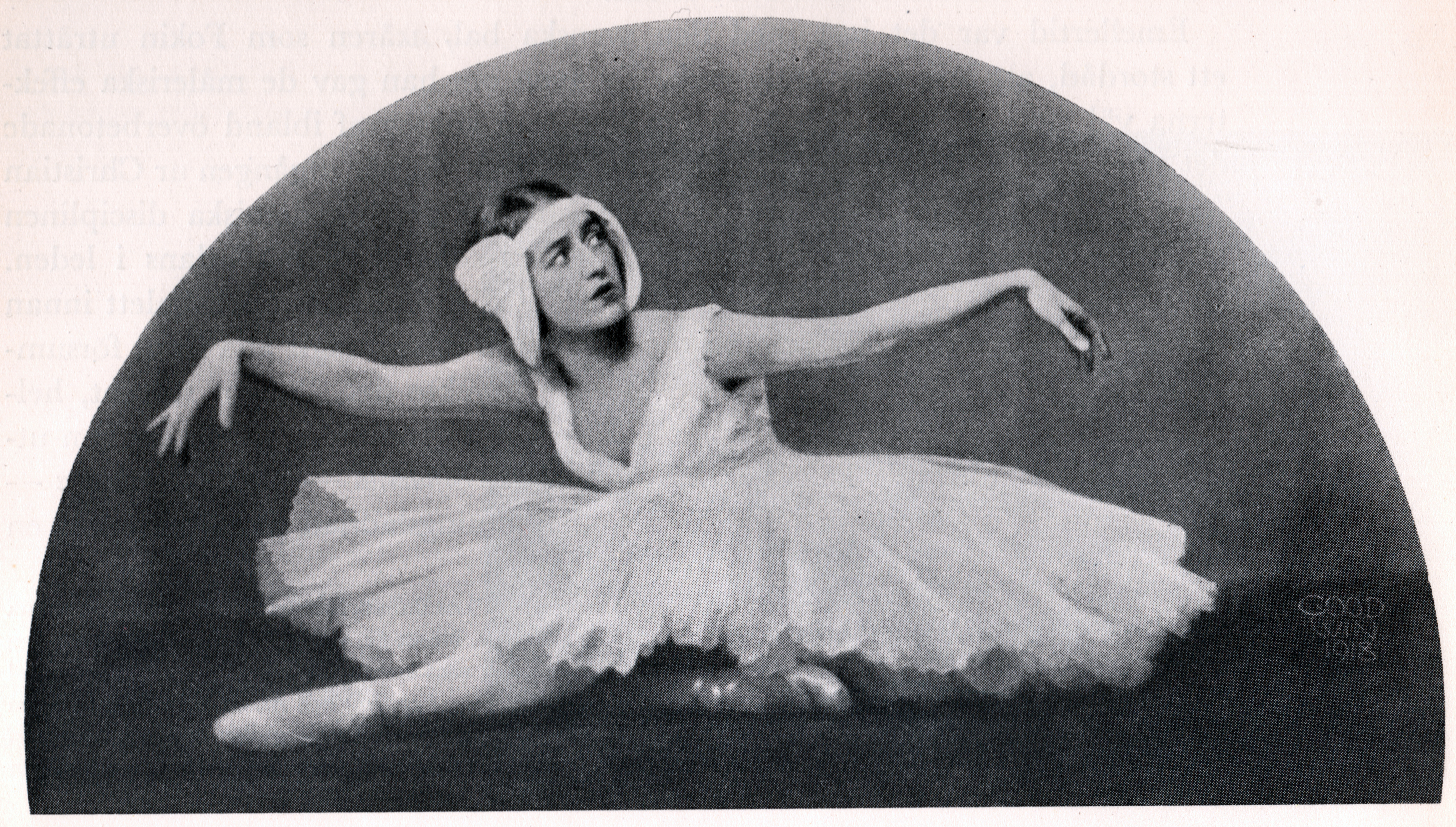 Balettdansören Jenny Hasselquist i Den döende svanen